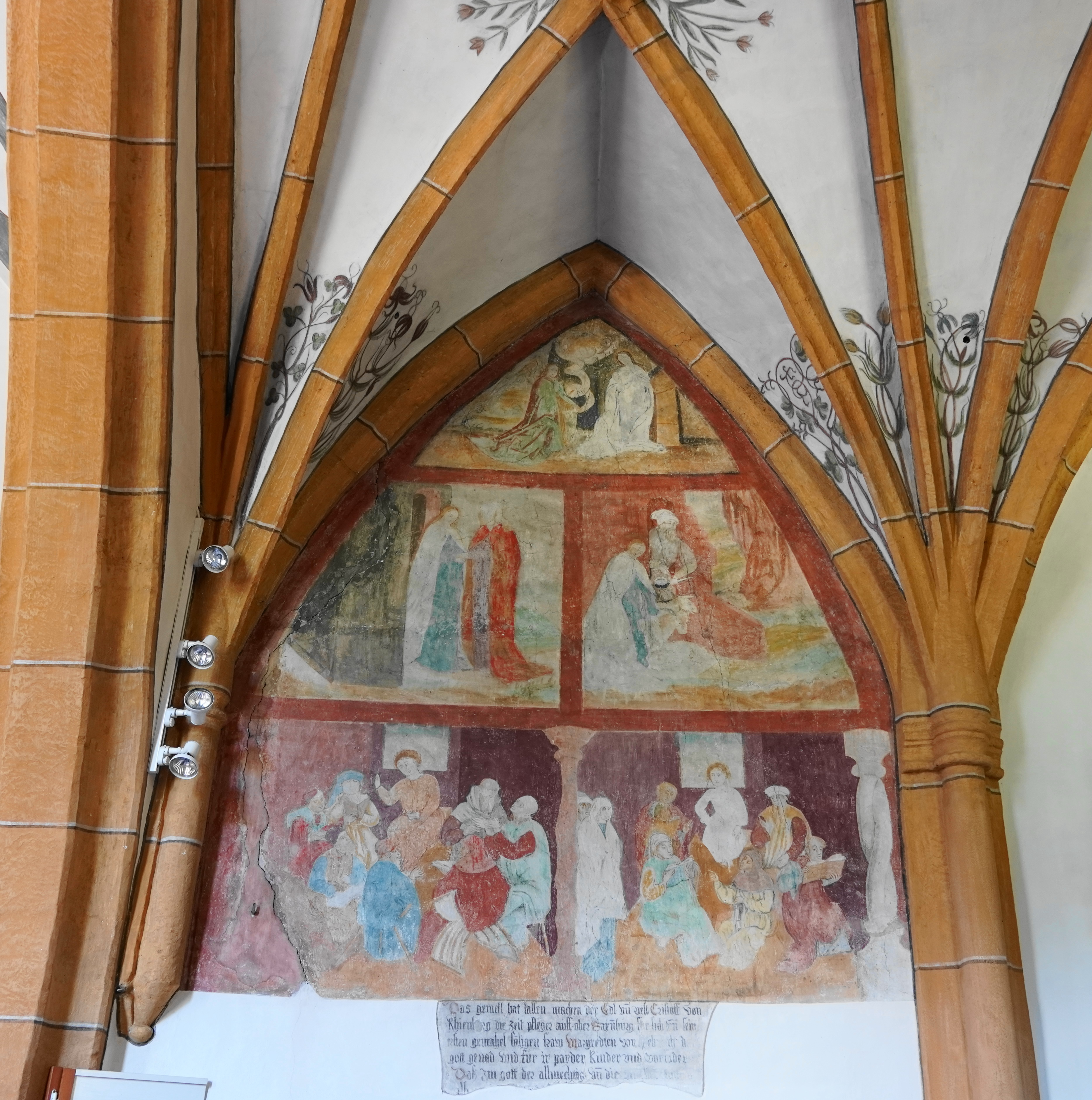 Kath. Pfarrkirche hl. Margaretha mit Friedhof